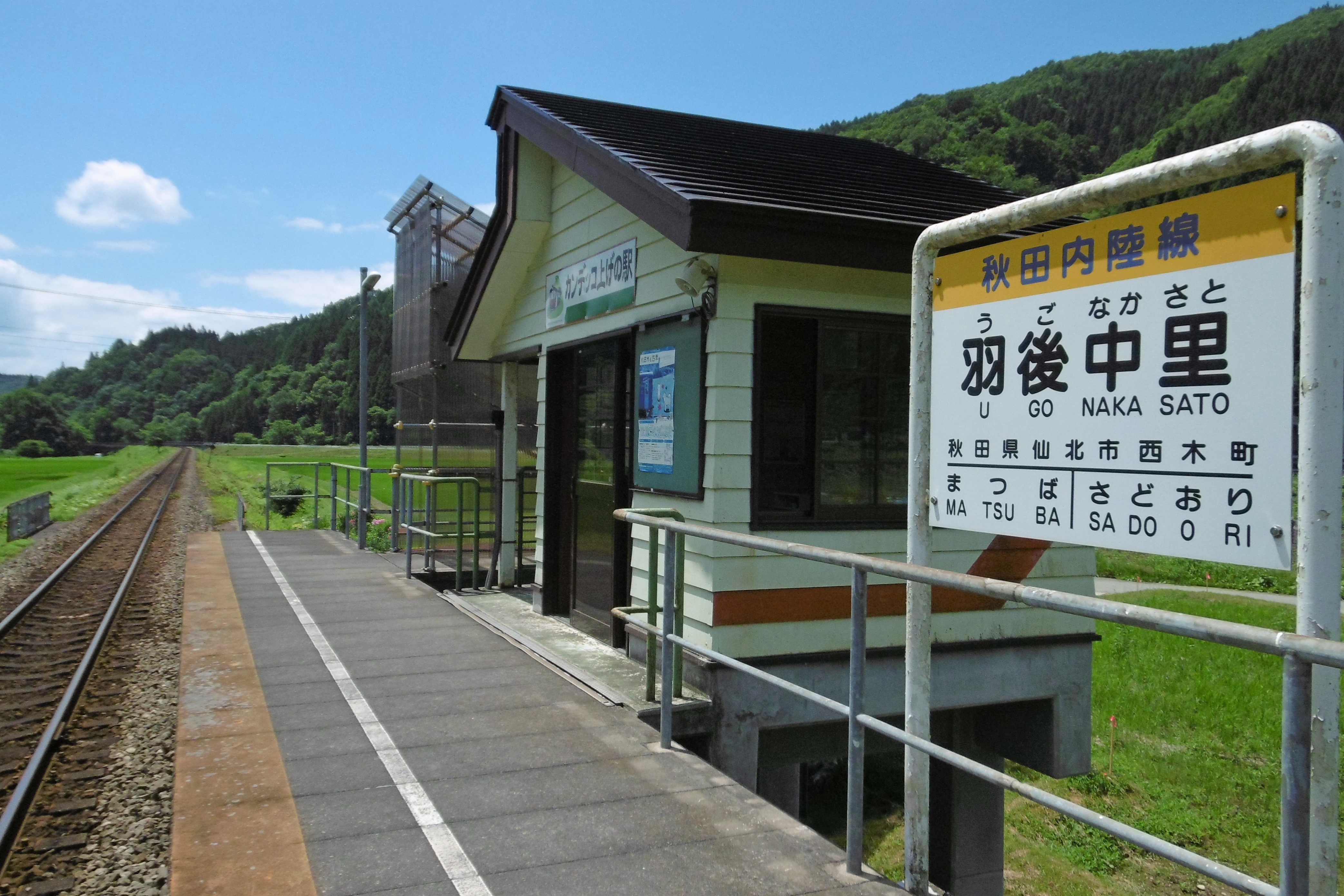 秋田内陸縦貫鉄道・羽後中里駅：秋田県仙北市西木町